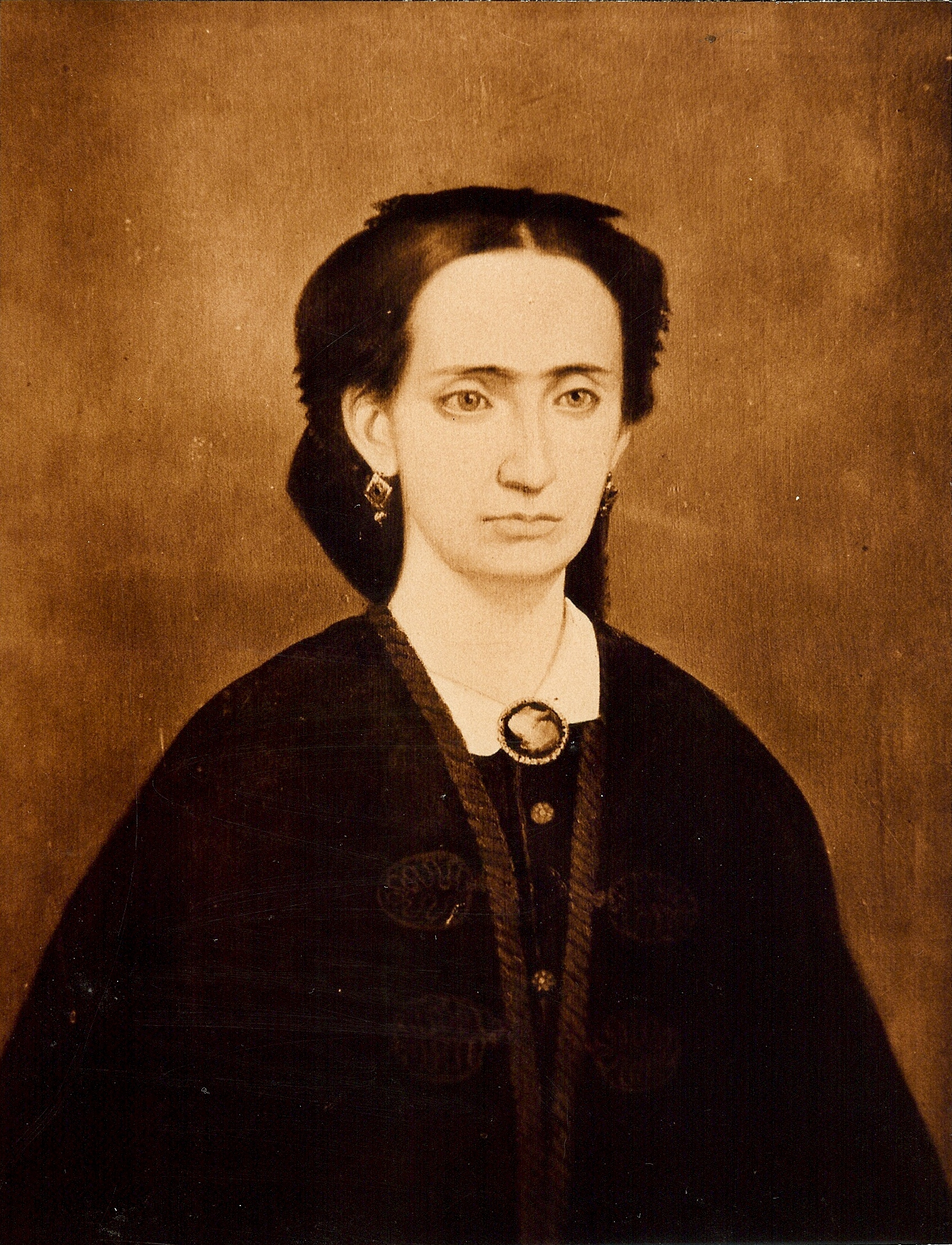 Fotografía de álbum de árbol familiar.